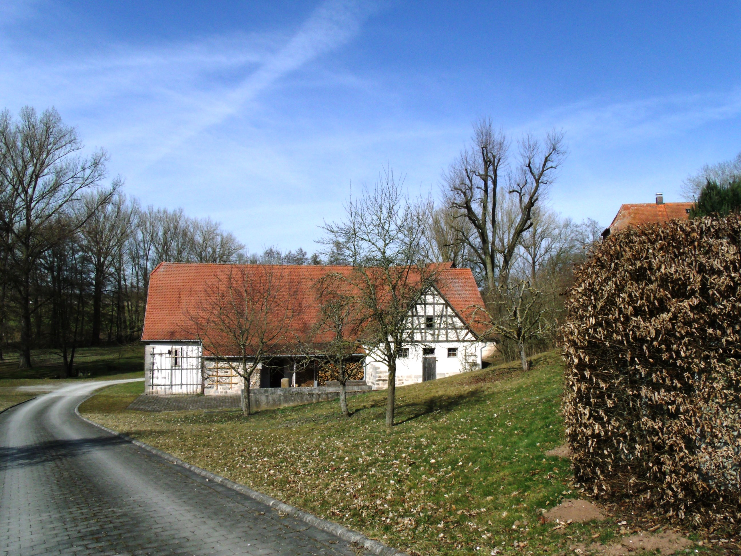 Holzmühle, Ortsteil von Leutershausen im mittelfränkischen Landkreis Ansbach, Fachwerkscheune